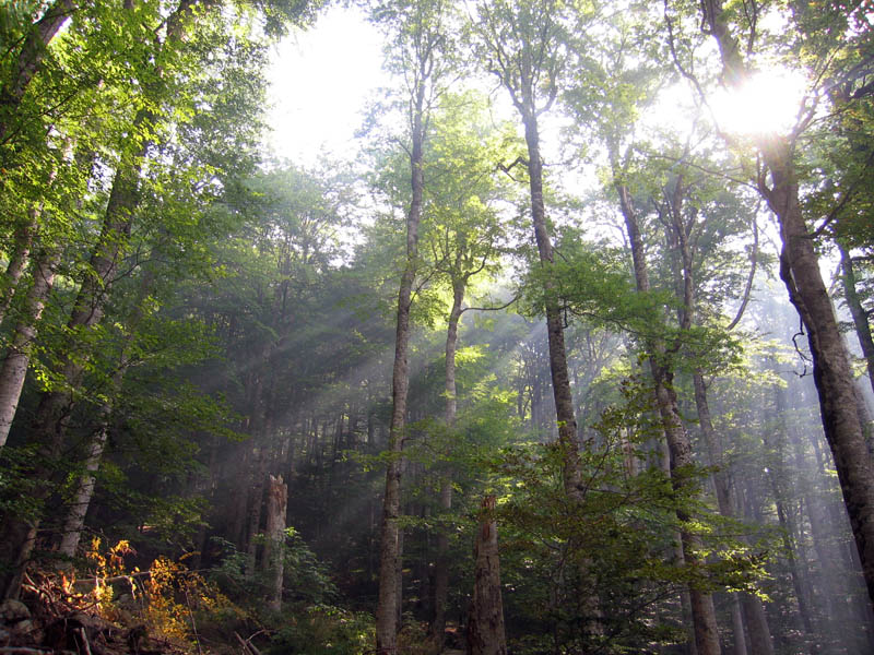 Prirodni rezervat Biogradska gora